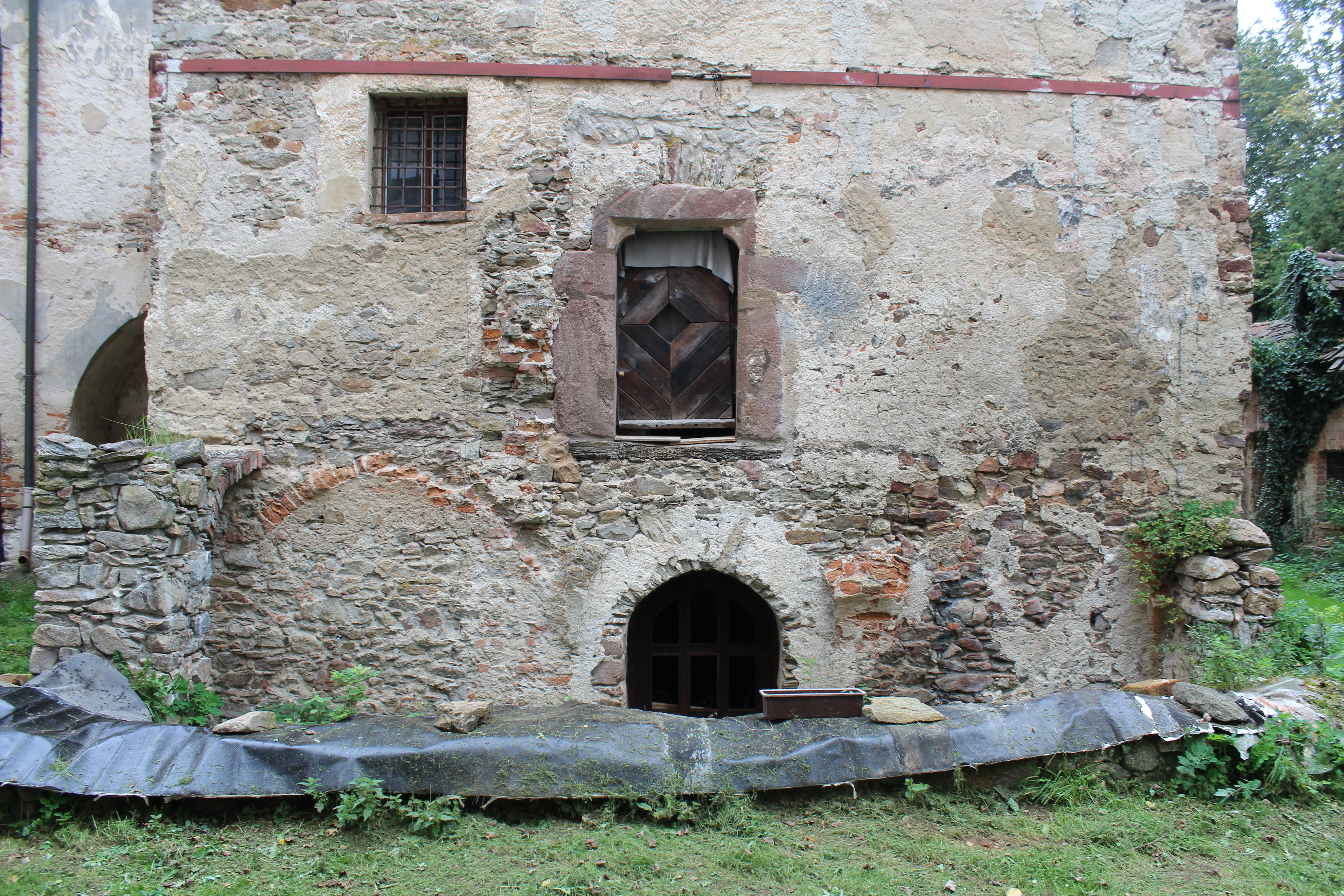 Gotická věž Vodní tvrze Popovice (okres Benešov) Vodní tvrz Popovice pohled z nádvoří na jižní stěnu věže ve směru jih - sever. Tvrz Popovice (Benešov) je vynikající ukázkou vývoje panského sídla od tvrze k renesančnímu a baroknímu zámečku. Nejstarší vývojovou fázi dochovaných částí tvrze dokumentuje právě gotická věž.